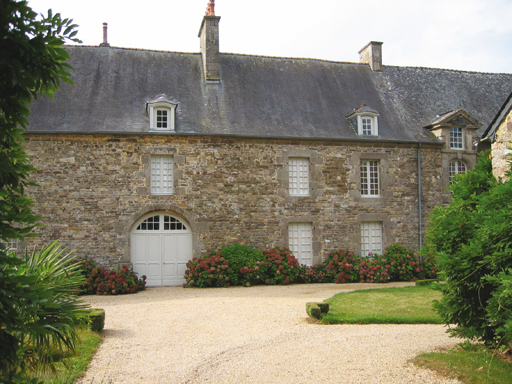 Ce château est une propriété privée, inscrit monument historique le 11 septembre 2012. Le propriétaire a ouvert ses portes lors de journées du Patrimoine